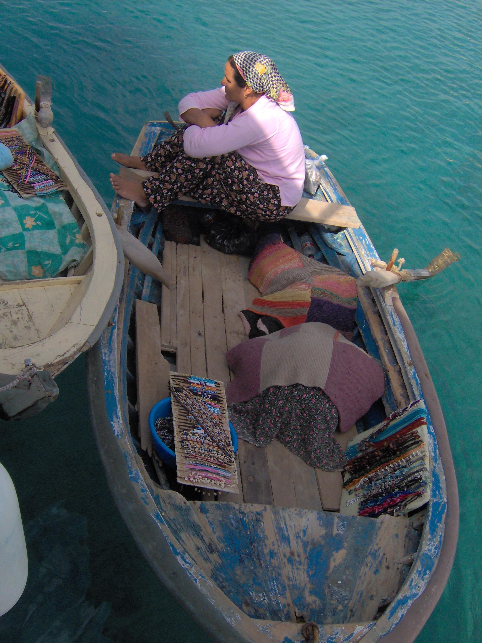 אישה טורקית מוכרת את מרכולתה. קקובה, אנטליה, טורקיה